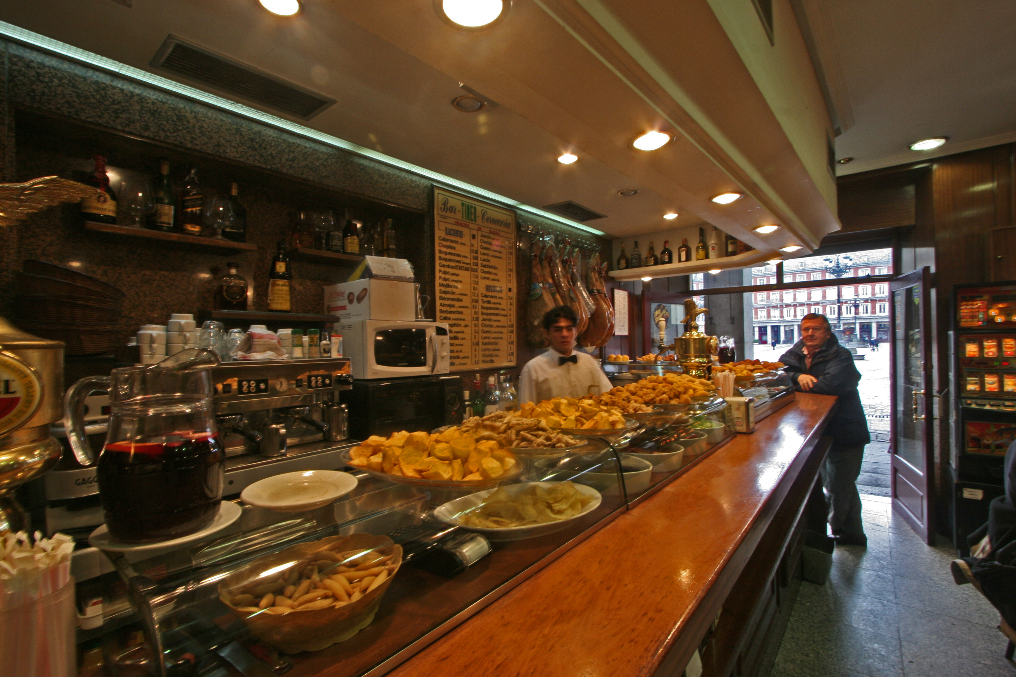 Tapas bar and restaurant at Plaza Mayor, Madrid